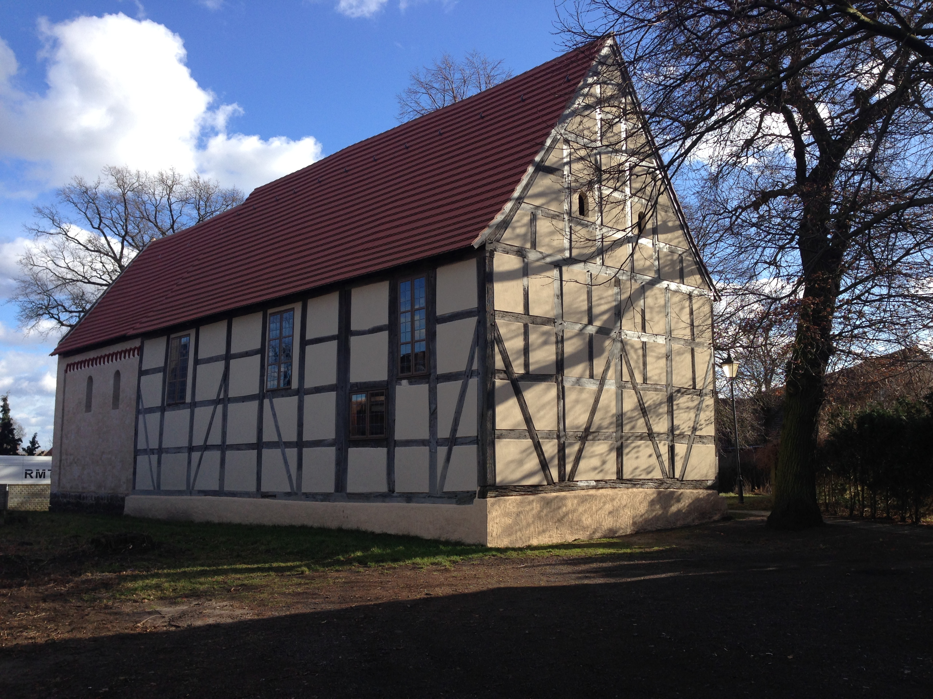 Dorfkirche in Schlagenthin, Ansicht von Nordwest, Februar 2014 nach Überarbeitung der baulichen Hülle